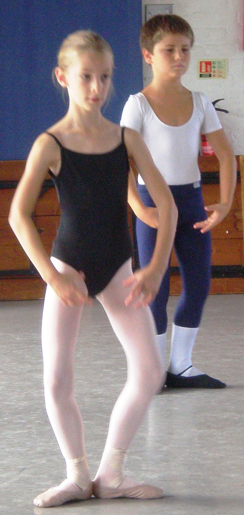 Деми-плие